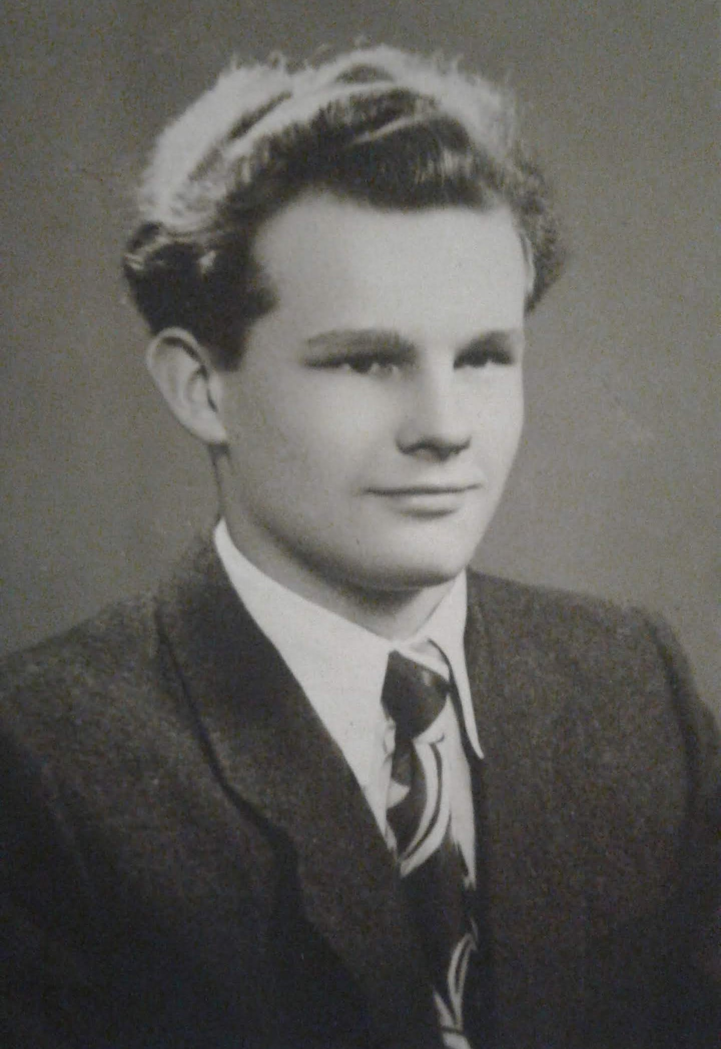 Jerzy Wojtowicz - po wojnie